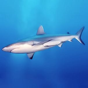 Un gran tiburón surcando aguas oceánicas.